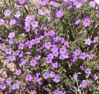 File:arnbnsj